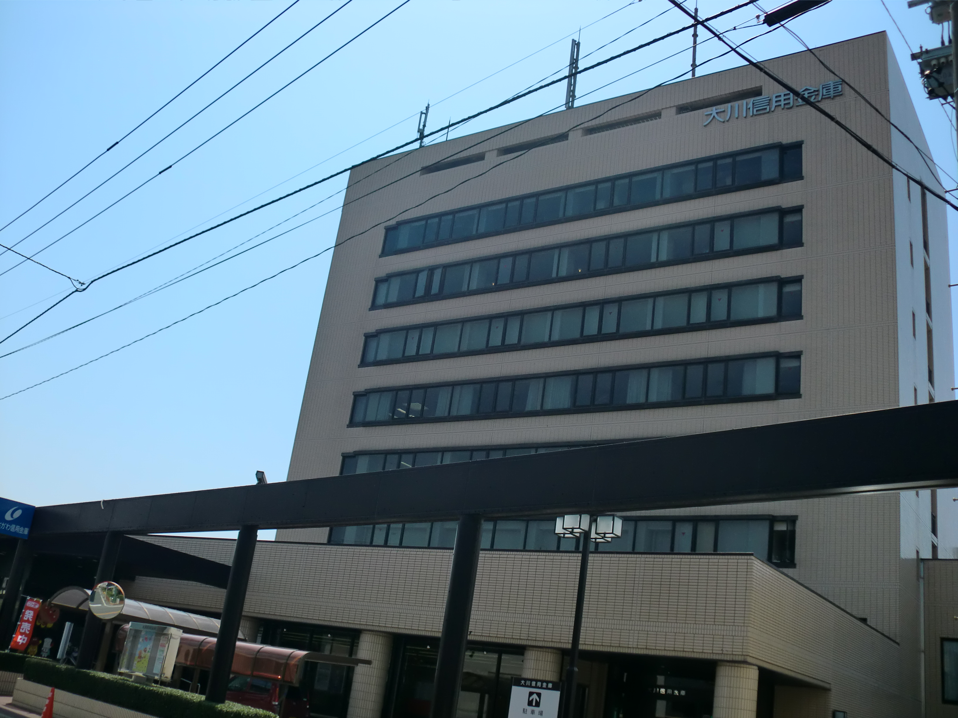 福岡県大川市にある大川（おおかわ）信用金庫本店